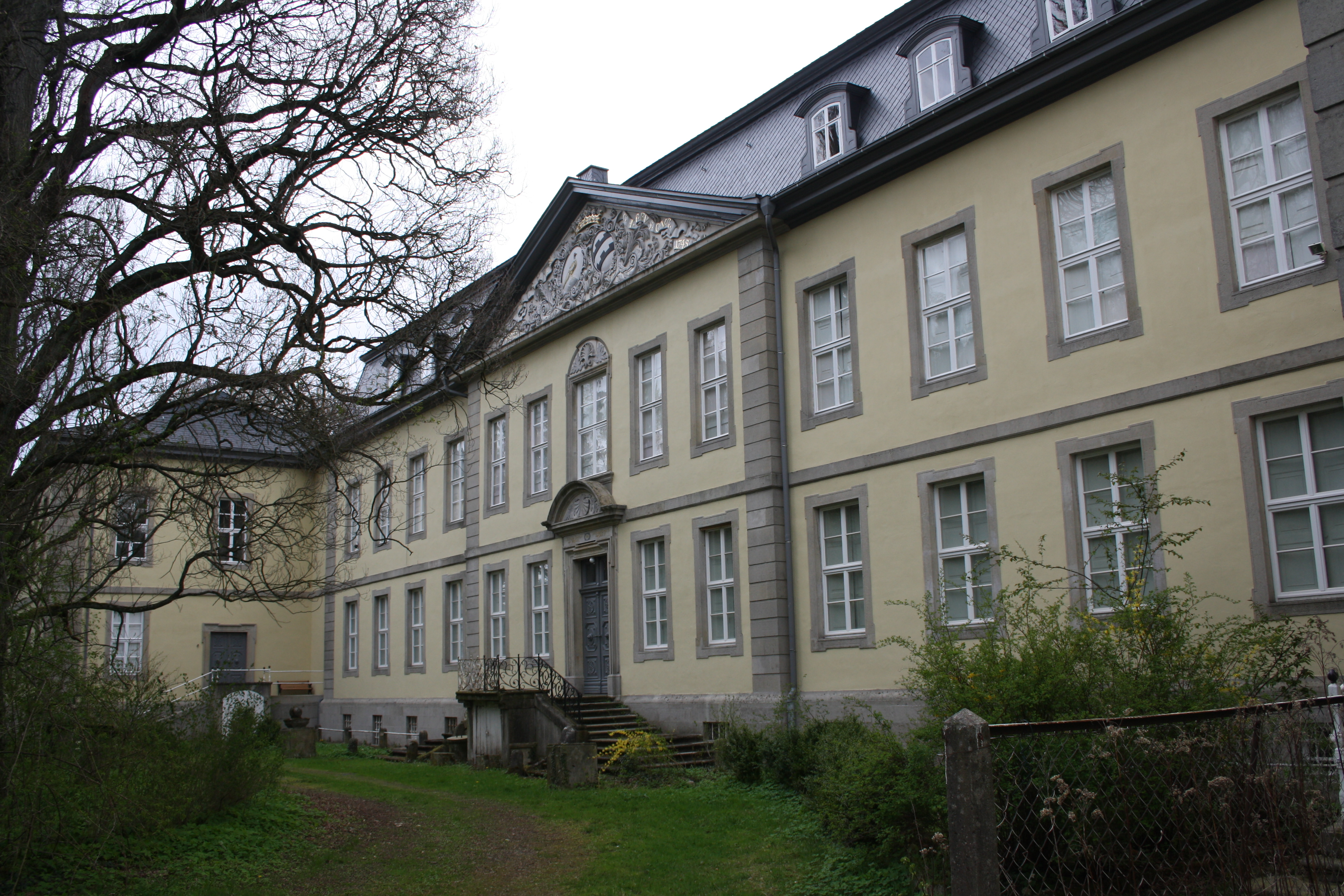 Vorderseite des Schloss Wrisbergholzen nach der Renovierung 2016, Blick aus Süden